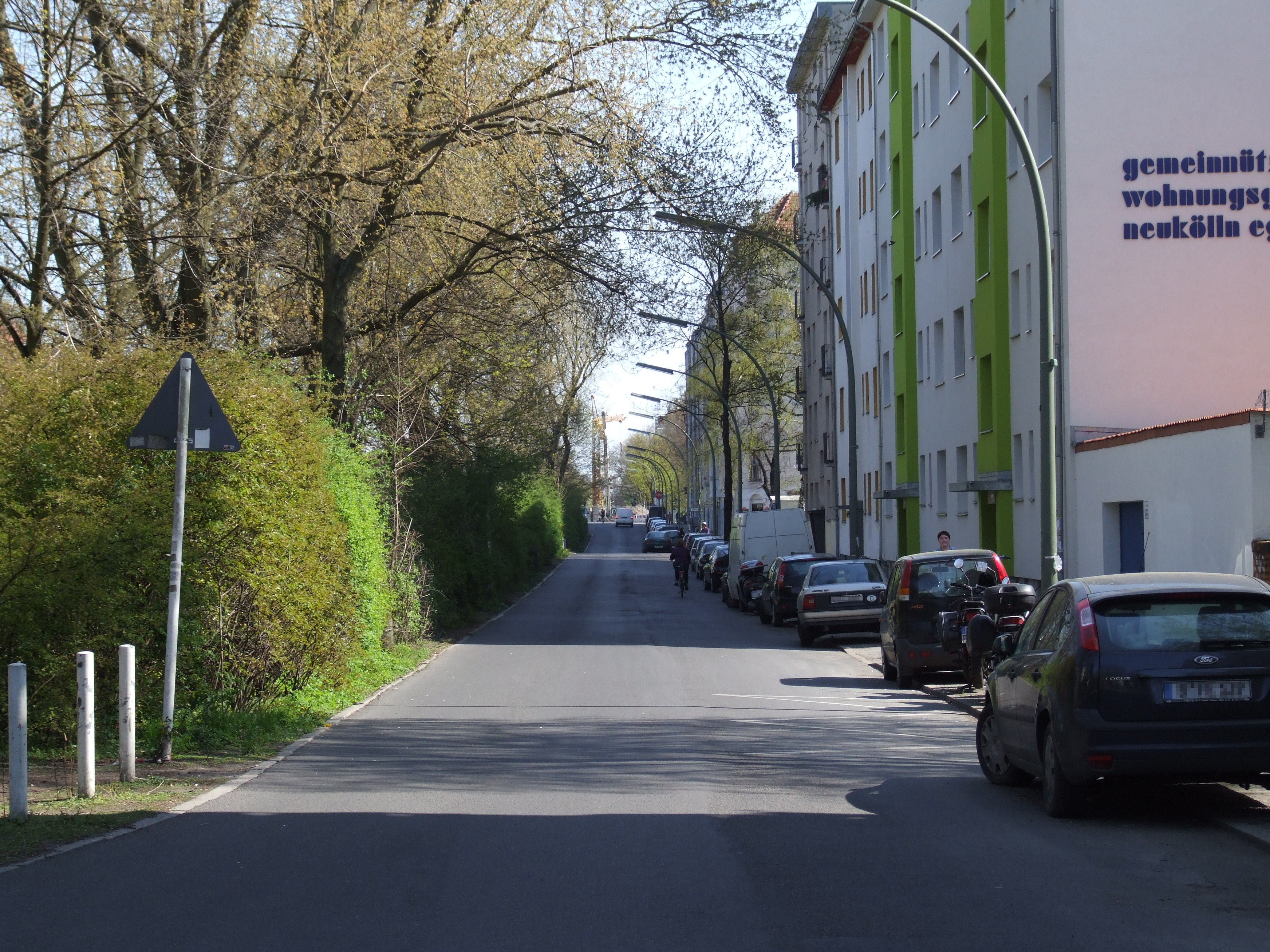 Weigandufer in Berlin-Neukölln